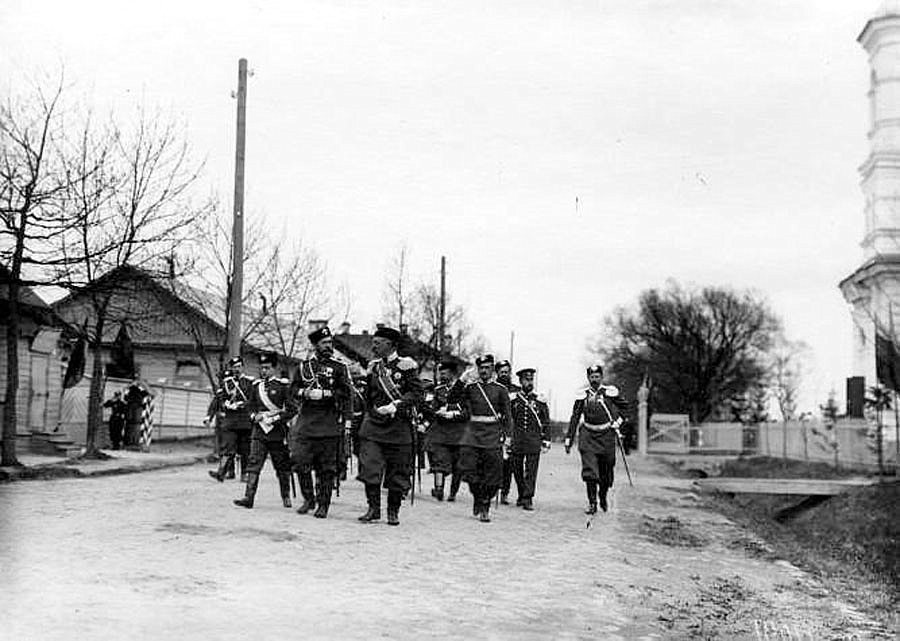 Император Николай II, шеф батальона великий князь Дмитрий Павлович (слева от императора) с командиром 2-ого Царскосельского стрелкового батальона генералом С.И.Кутеповым и офицерами. Справа видна высокая часть церкви Сергея Радонежского в Фуражном переулке